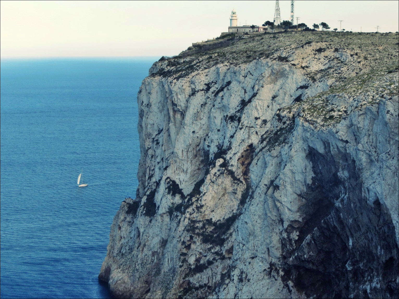 Cabo de San Antonio